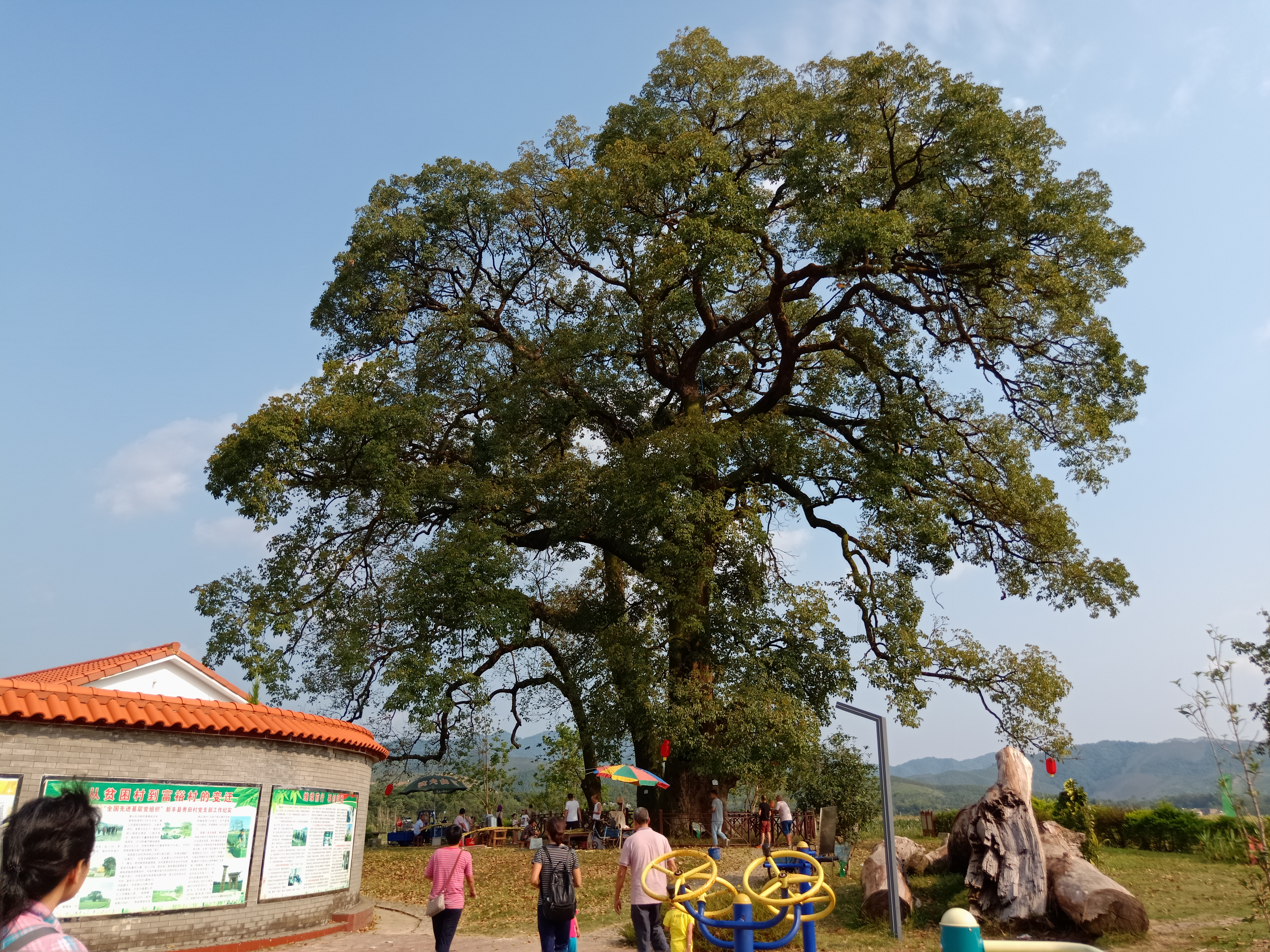 粵語: 喺廣東韶關新豐縣秀田村入面嘅秀田古樹景區，樖樹名係重陽木。